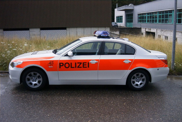 Polizeifahrzeug BMW 5er (E60)